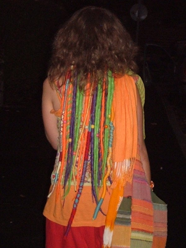 Atebas et dreads.